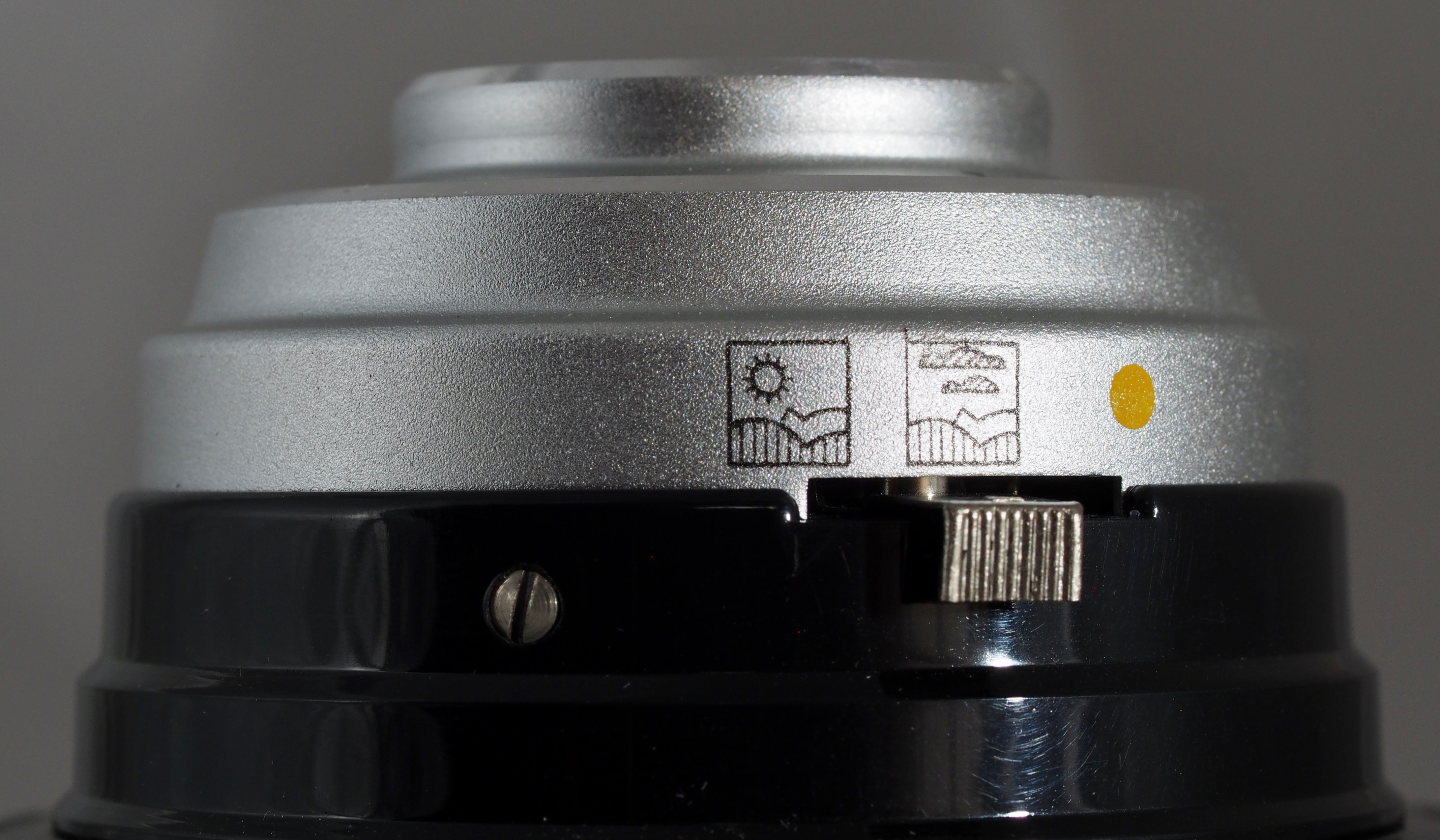 Click Blende 2 Symbole und Gelbfilter